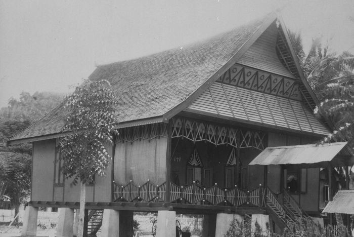 Foto. Huis van de vorst van Donggala